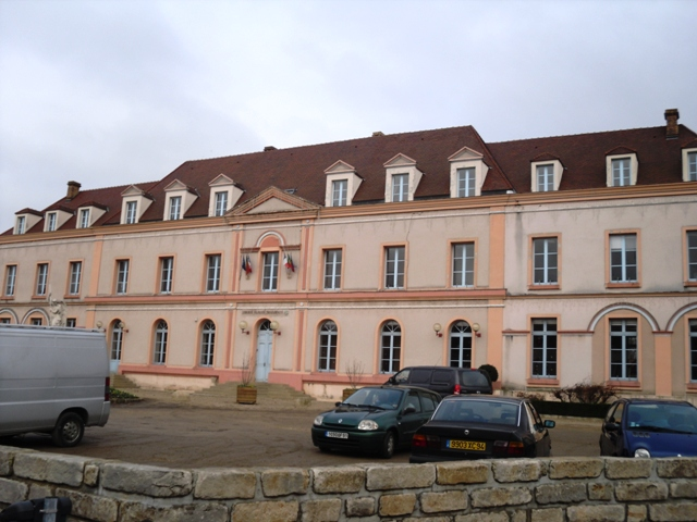 Le château Saint-Michel de Morangis (91)